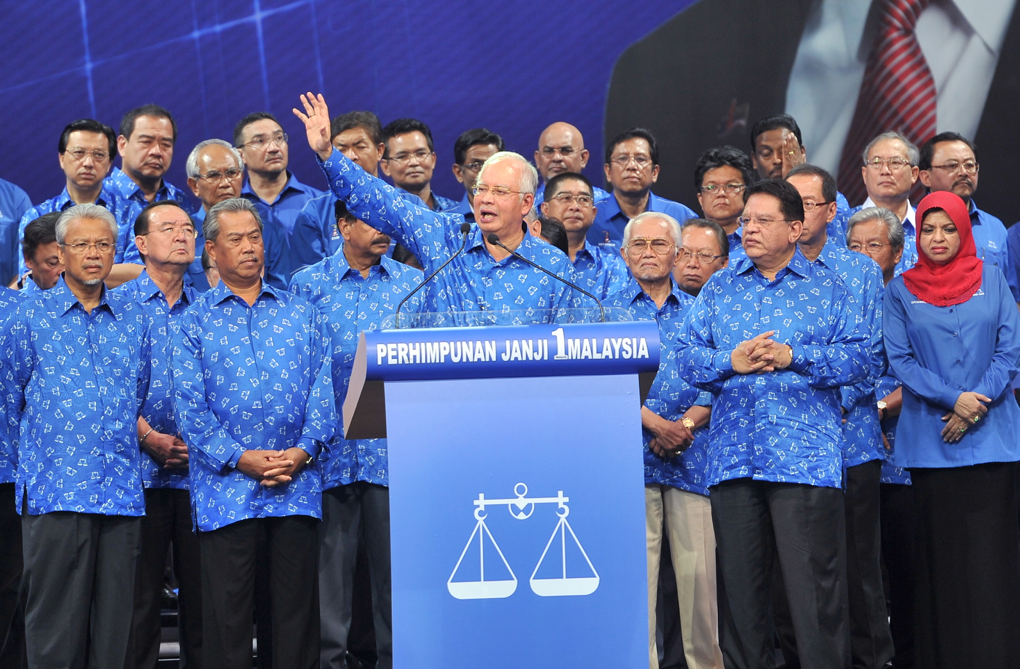 Kuala Lumpur, 07/04/2013.(C) BN chairman Datuk Seri Najib Tun Razak speaks during launch manifesto ahead of upcoming polls during a Barisan Nasional, rally at a stadium in Bukit Jalil. pix Firdaus Latif